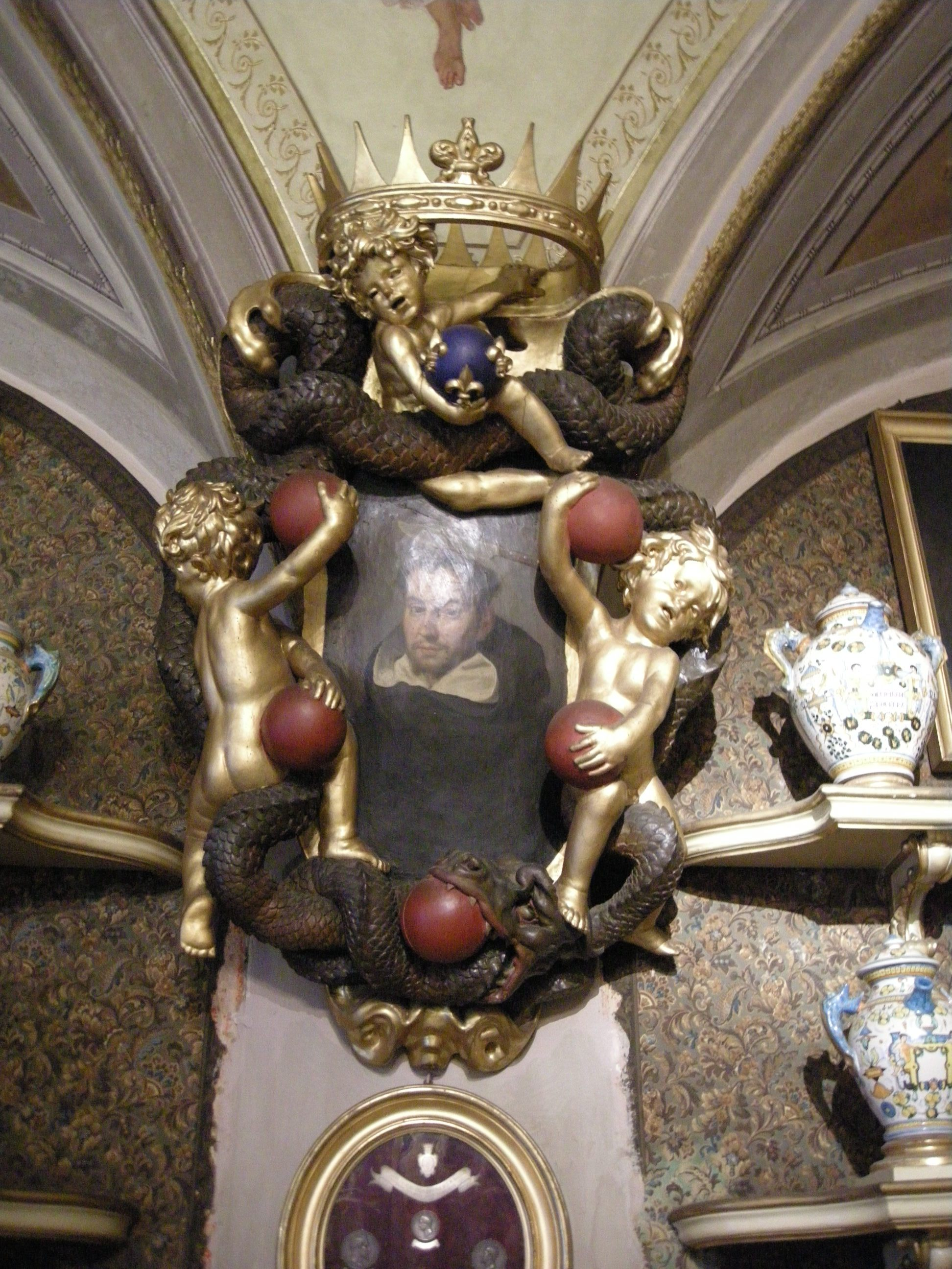 Farmacia di smn, sala verde 04 stemma medici